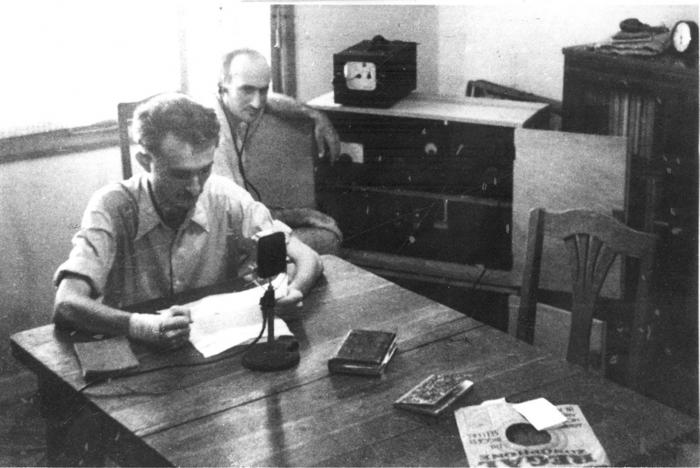 שידור רדיו של קול לוחמי חרות ישראל, מביתו של פנחס גינוסר בתל-אביב. בתצלום נראים: סירקיס הטכנאי ודוד ינאי הקריין.